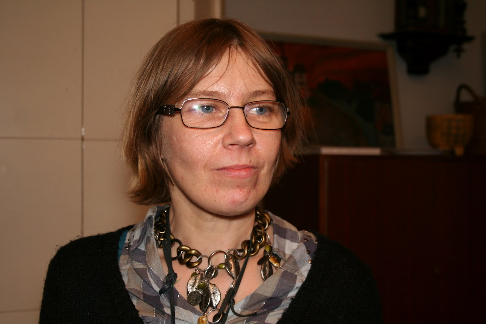 Piret Bristol Kirjanike Liidu korraldatud Kulka kirjanduse sihtkapitali aastaauhinna nominendide tutvustusesinemisel Tartus